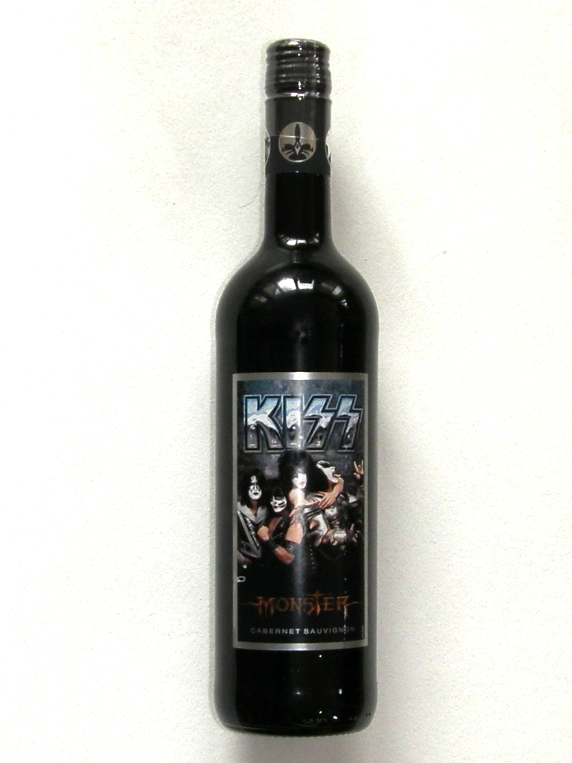 Bouteille de vin californien cépage cabernet sauvignon, année 2010, mis en bouteille à l'occasion de la tournée mondiale de Kiss en 2013